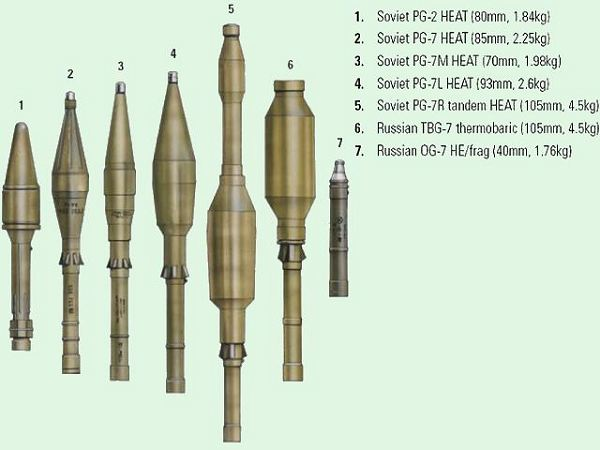 Đầu đạn HEAT từ số 1 đến 5 là những đầu đạn áp dụng quy tắt nổ lõm trong đó đầu đạn số 5 có đầu đạn kép, đầu đạn phụ có tác dụng như mồi kích nổ lớp giáp phản ứng nổ (ERA - Explosive Reactive Armor) trên các xe tăng và xe bọc thép hiện đại tạo điều kiện cho đầu đạn chính có khả năng phát huy tác dụng của nó. Các đầu đạn số 6 là đầu đạn nhiệt áp dùng trên các mục tiêu kiên cố như công sự và 7 là đầu đạn nổ phân mảnh, hiệu quả chống bộ binh. hai đầu đạn này không áp dụng lượng nổ lõm.